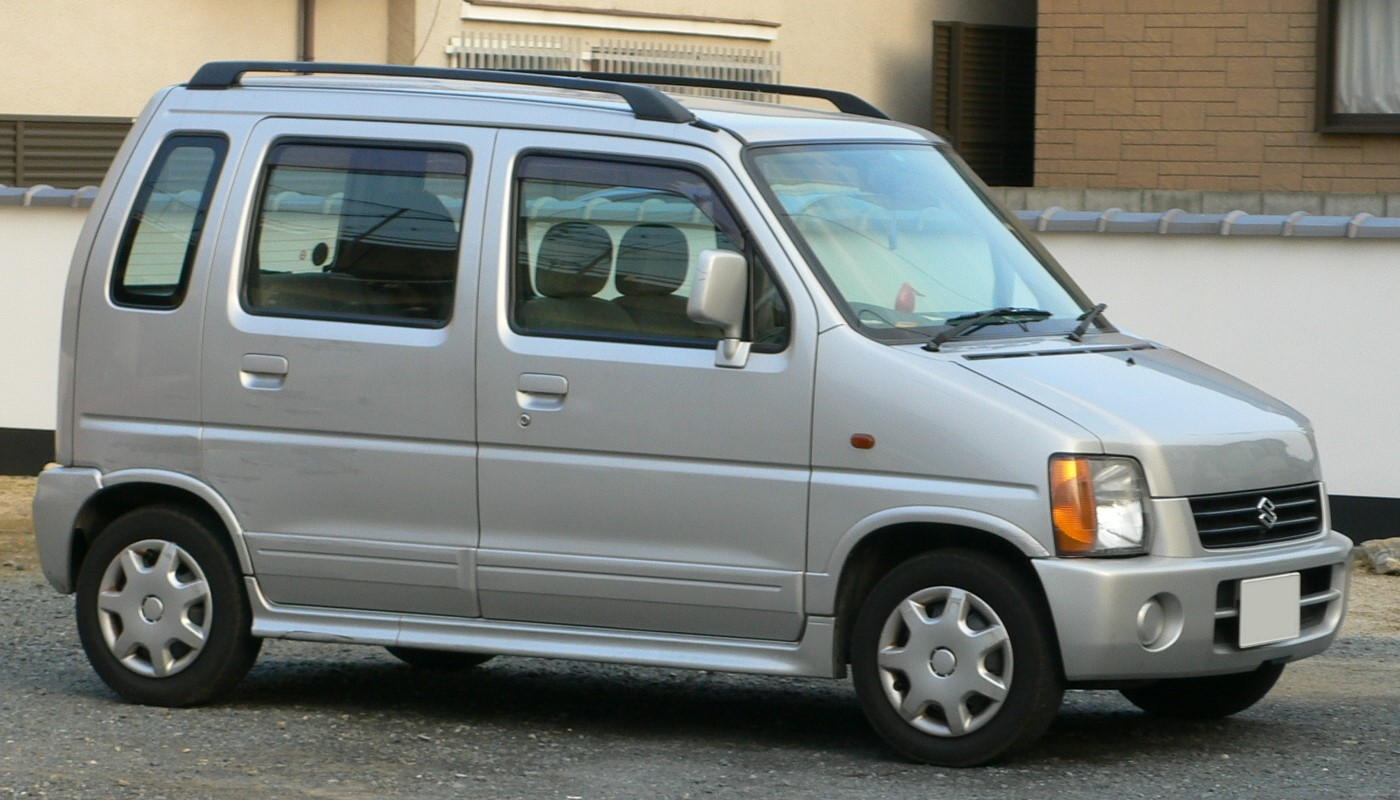 Suzuki_WagonR-Wide(1998-1999)